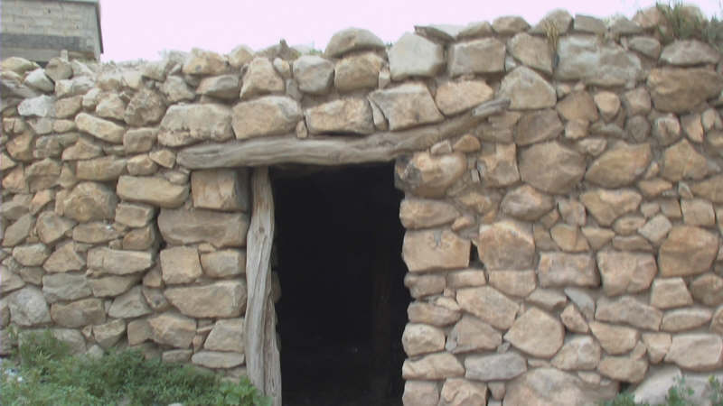 Maison traditionnelle berbère chaouie à T'kout